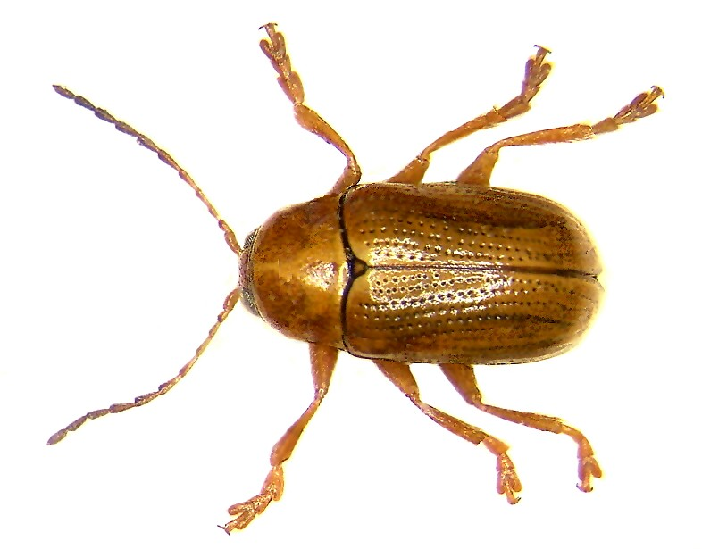 Cryptocephalus cognatus Costa, 1888 Familie: Chrysomelidae Grösse: 2 mm Verbreitung: Südeuropa Fundort: Korsika, Porto leg. U.Schmidt, 1973; det. Fritzlar Foto: U.Schmidt, 2006